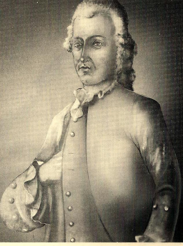 Scan eines alten stark beschädigtem Ölgemäldes